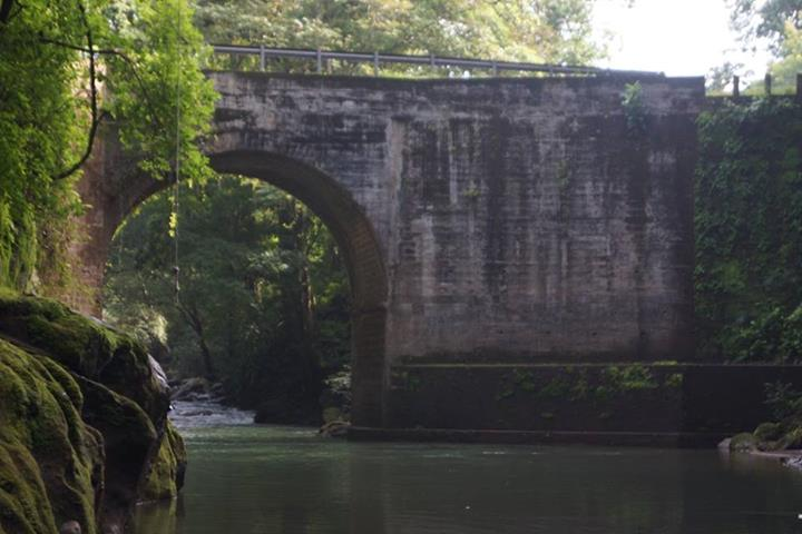 Paso del Rio Jesus Maria por el puente Las Damas, San Mateo.